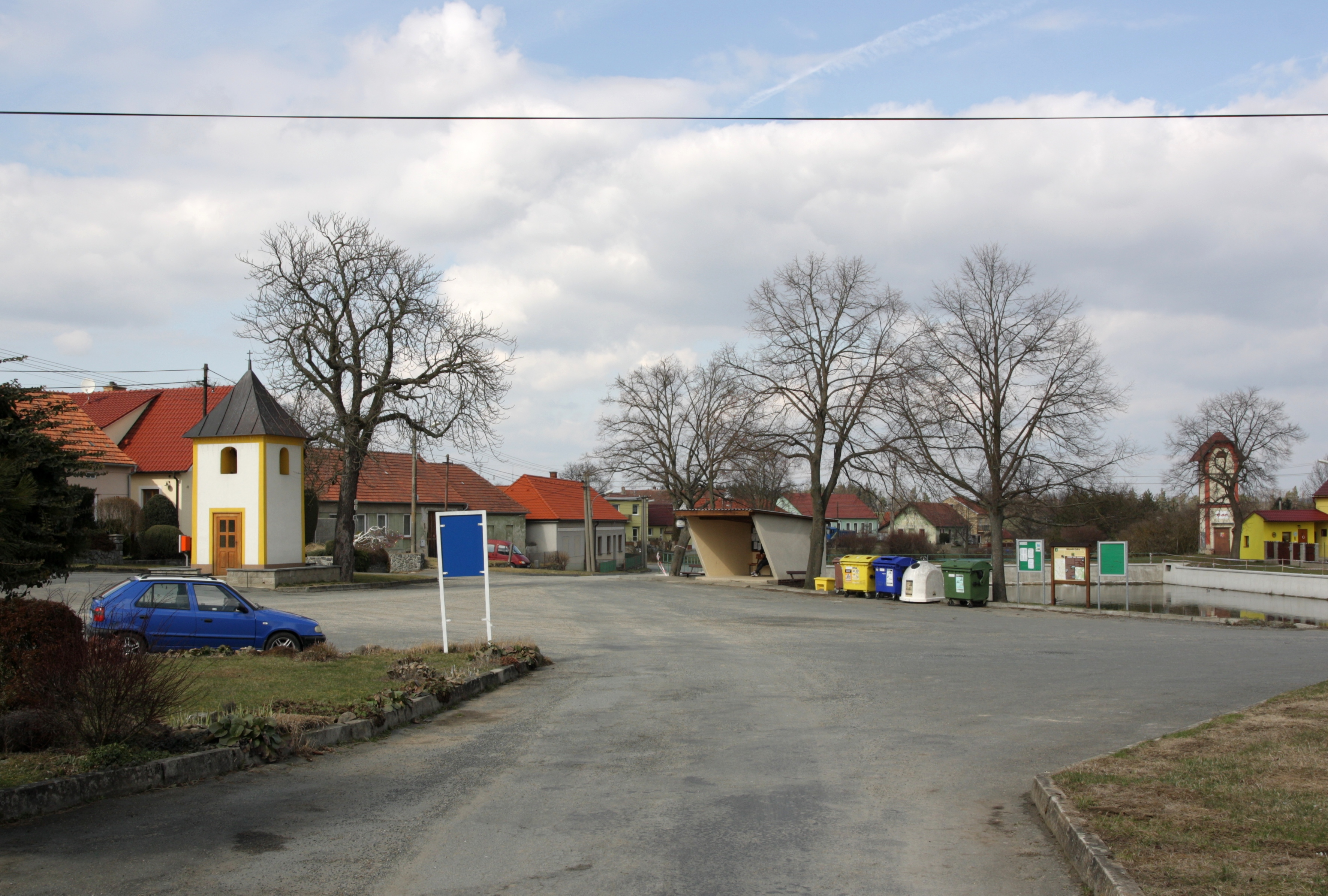 Zňátky - náves, pohled od jihu